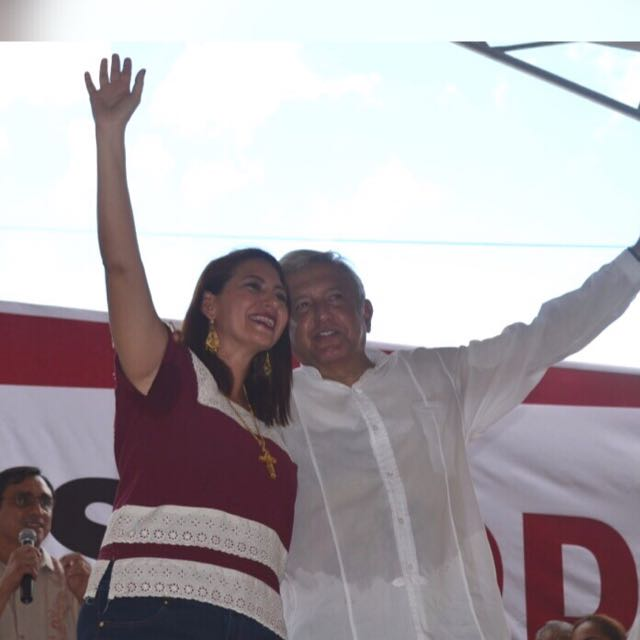 Alpha Tavera y AMLO en la Firma del Acuerdo de Unidad por la Prosperidad del Pueblo y el Renacimiento de México en Mérida, Yucatán.